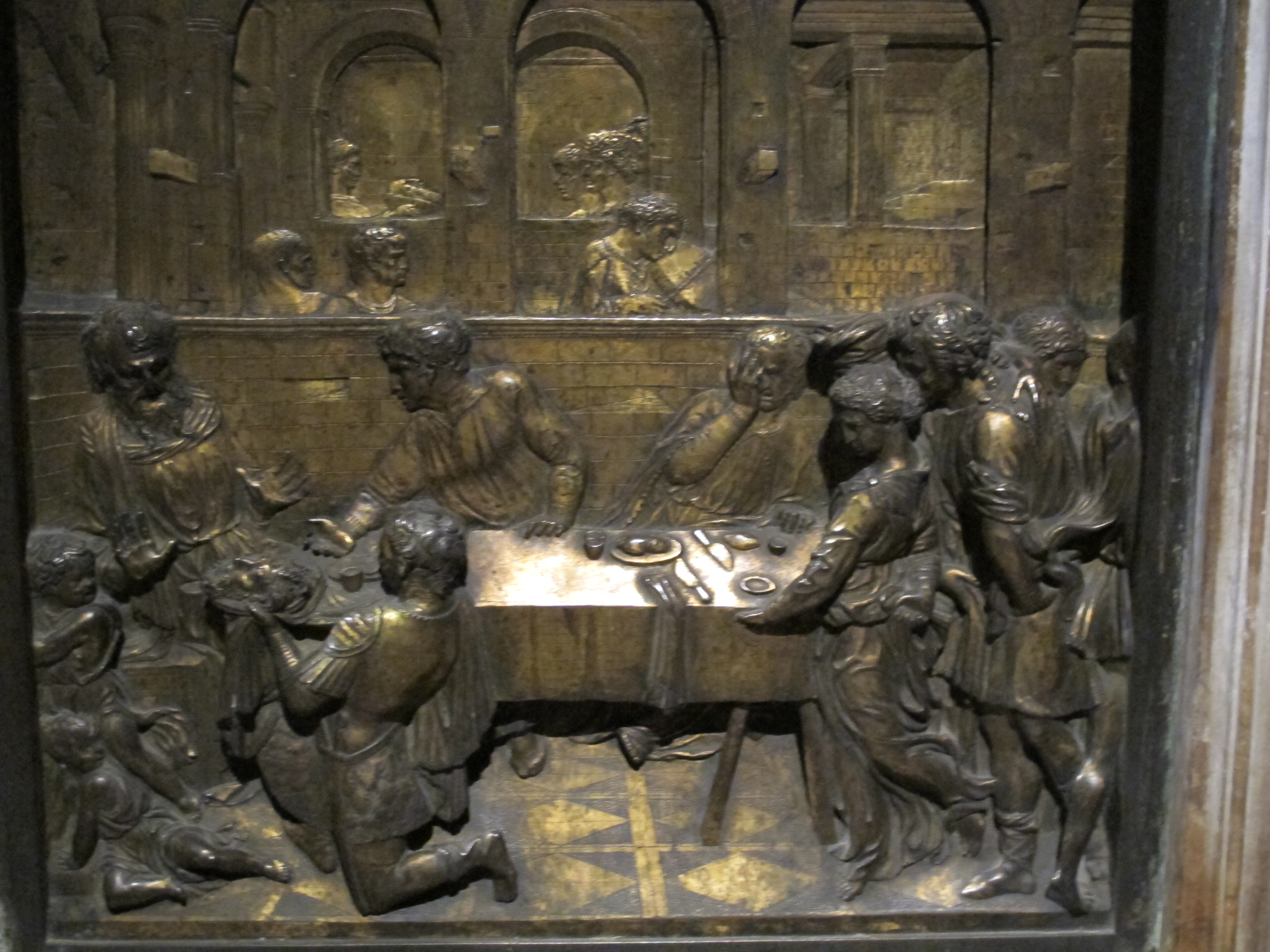 Fonte battesimale, donatello, banchetto di erode, 1427